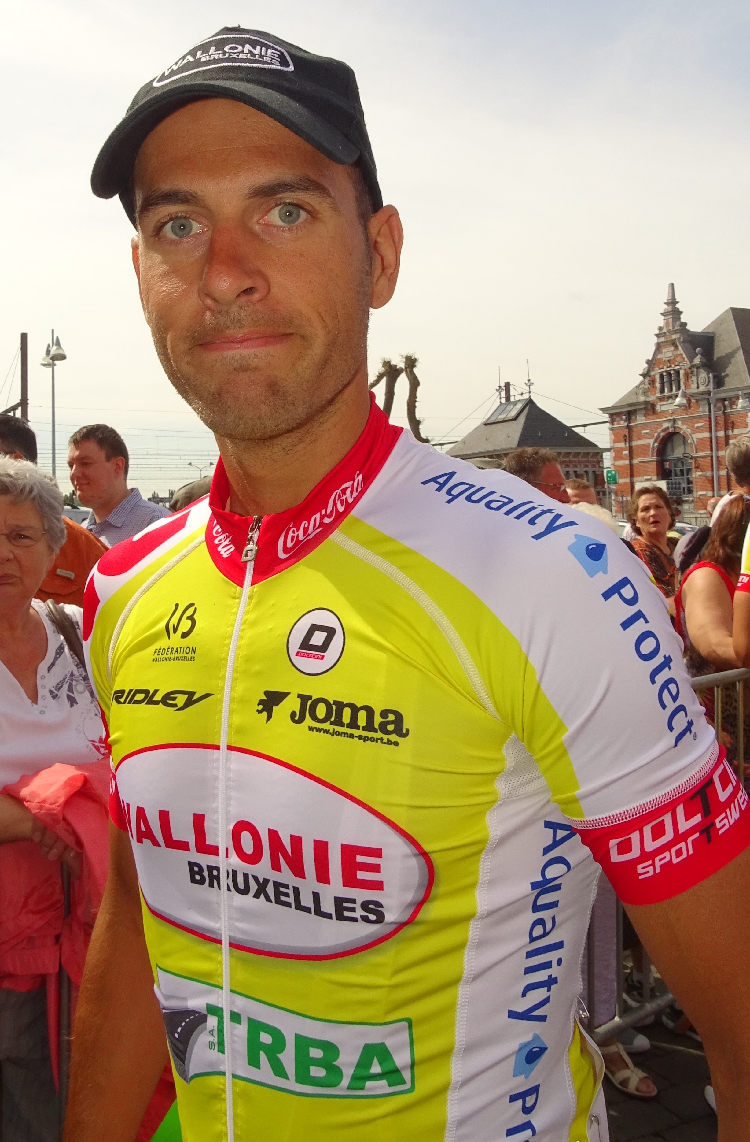 Reportage réalisé le mercredi 22 juillet à l'occasion du départ du Grand Prix Pino Cerami 2015 à Saint-Ghislain, Belgique.